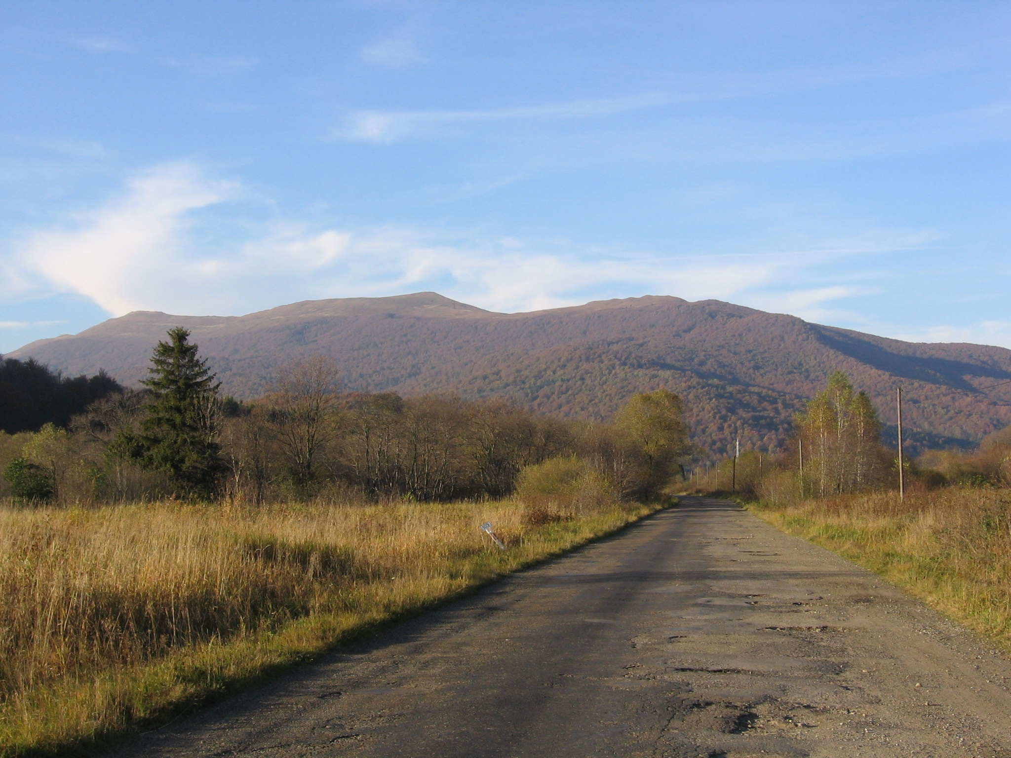 Bieszczady. Połonina Caryńska, widok z drogi Ustrzyki Górne - Wołosate. Autor: Paweł B.